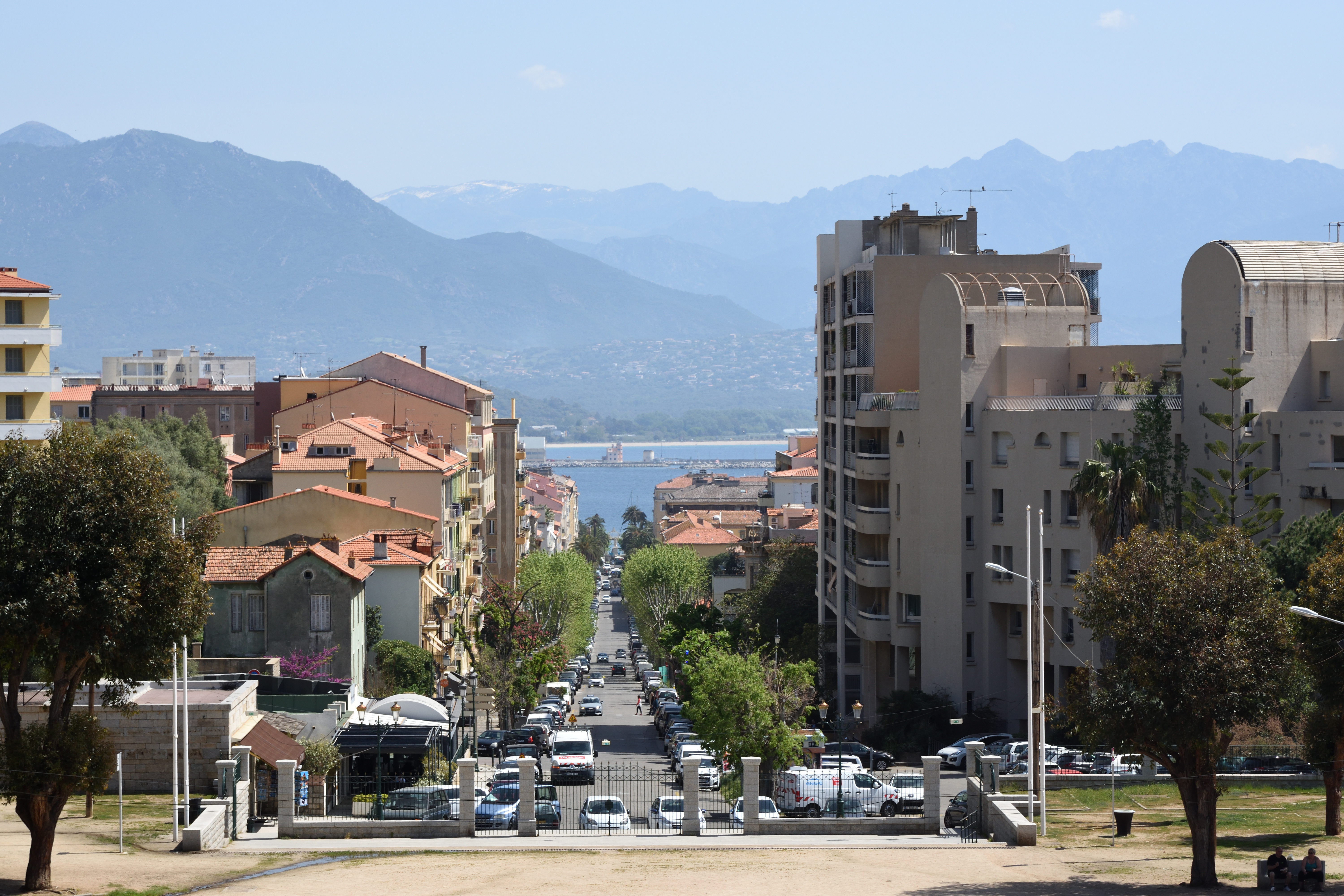 Ajaccio, vue du monument de Napoléon par le cours Leclerc / cours Grandval au port